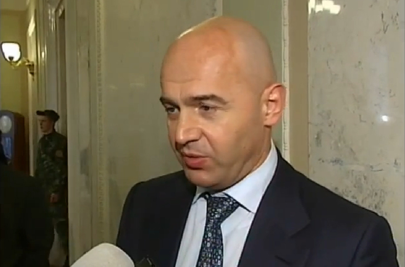 Кононенко Ігор Віталійович — український бізнесмен і політичний діяч, народний депутат 8-го скликання, перший заступник голови фракції партії «Блок Петра Порошенка».